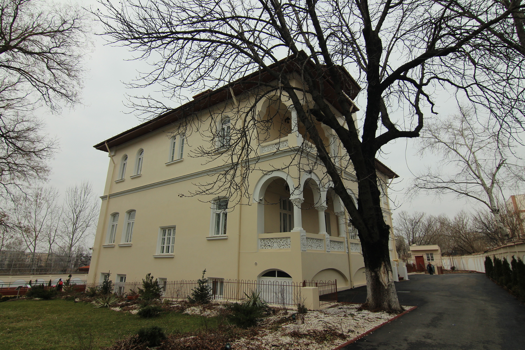 Conacul Golescu-Grant